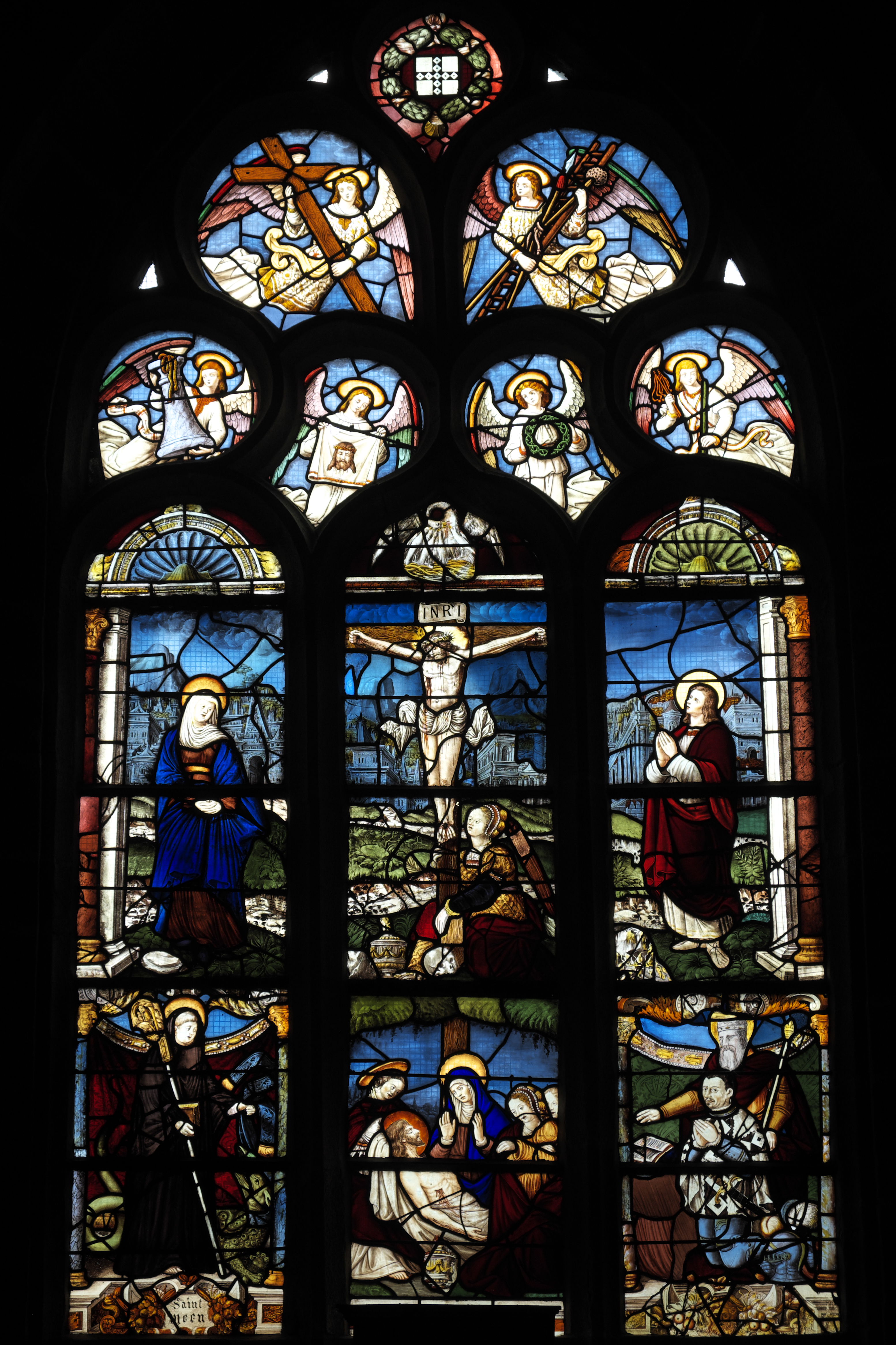 Kapelle Saint-Méen in Ploemel im Département Morbihan (Region Bretagne/Frankreich), Bleiglasfenster von 1556, Darstellung: Kreuzigung Christi